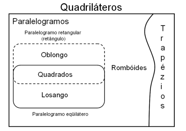 Paralelogramos